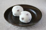 おまめたっぷりまめだいふく